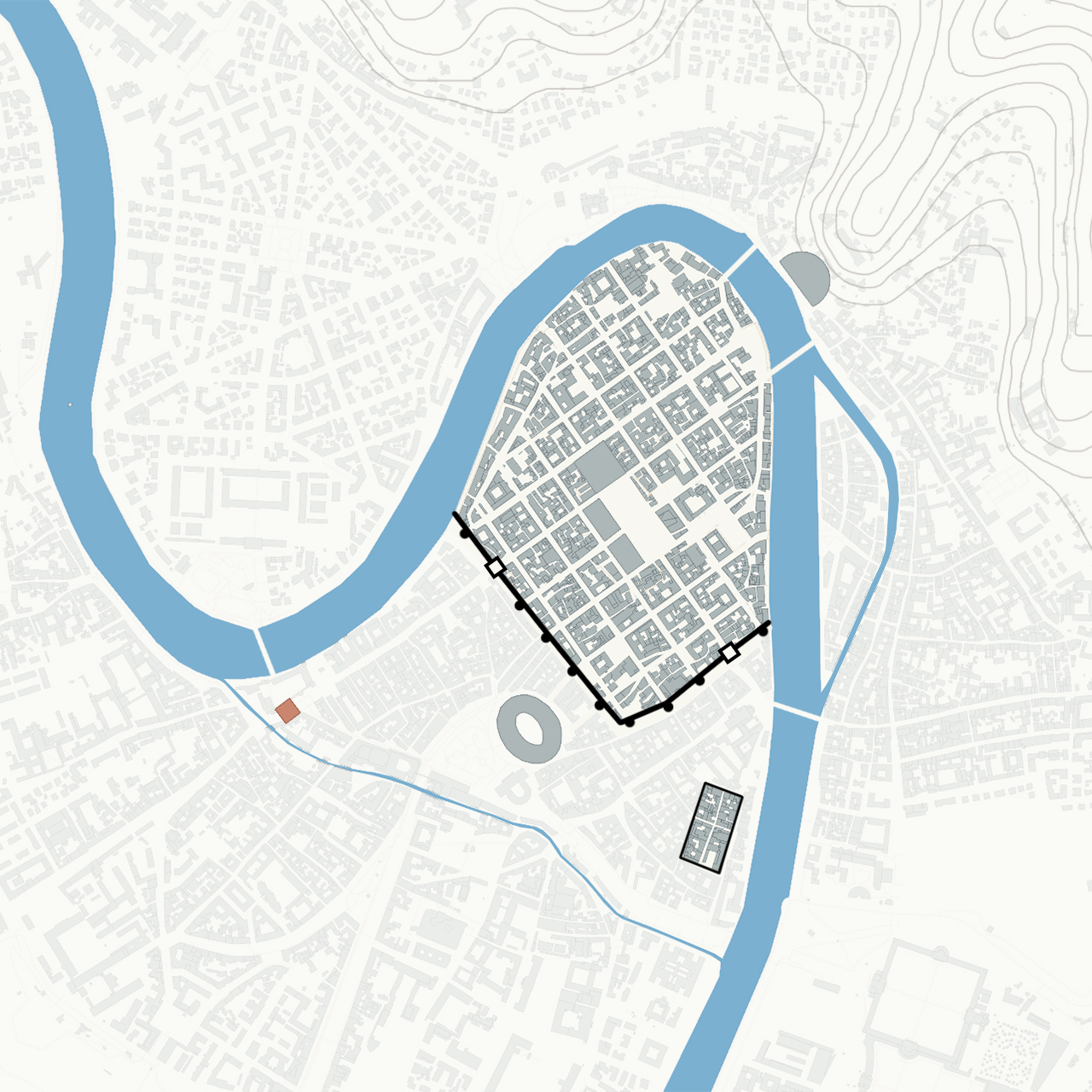 Planimetria della città di Verona con le mura e le porte urbiche principali, in rosso l'arco dei Gavi. Vedi anche Le mura di Verona di Annamaria Conforti Calcagni.